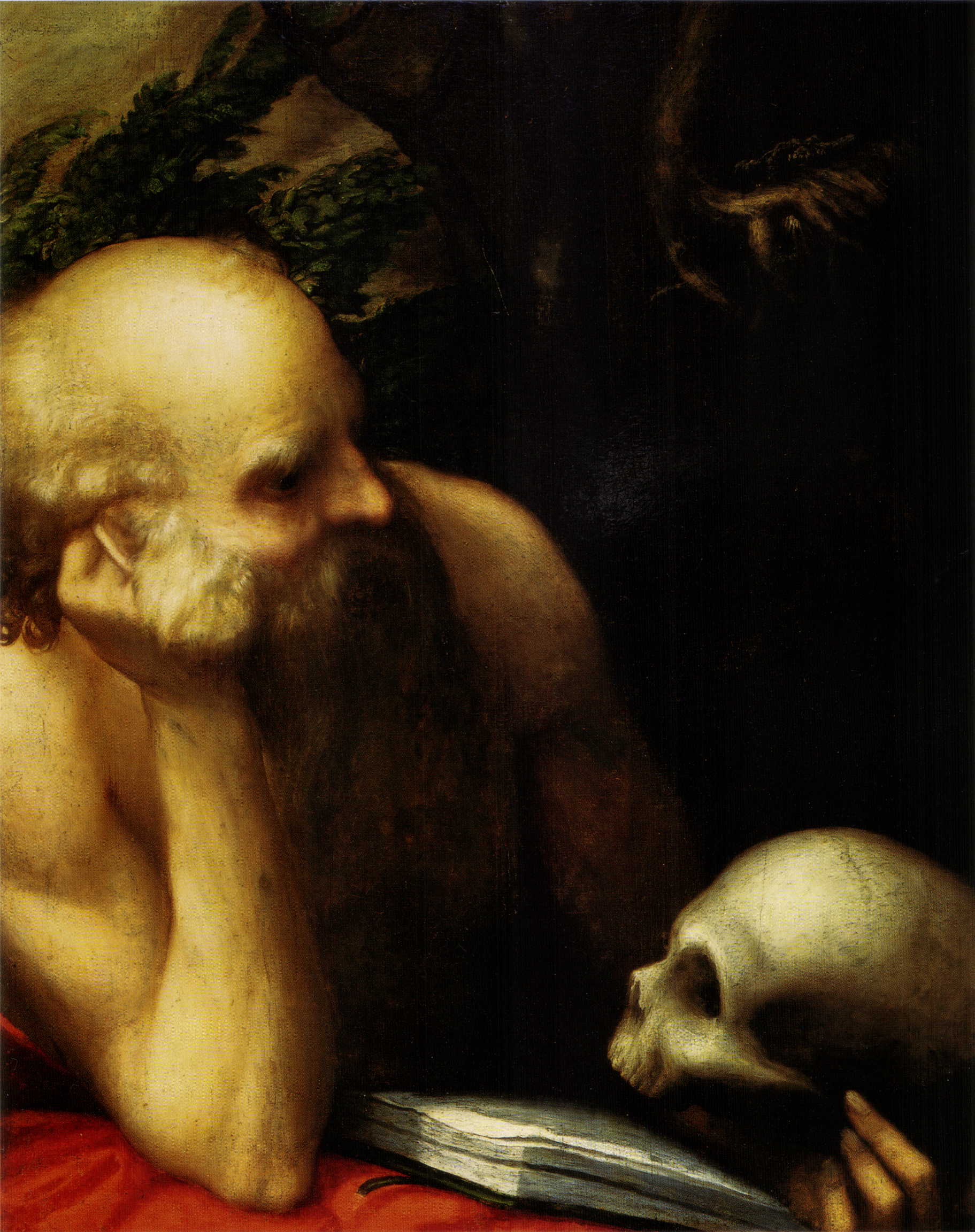 La obra representa a San Jerónimo, uno de los Padres de la Iglesia Católica.